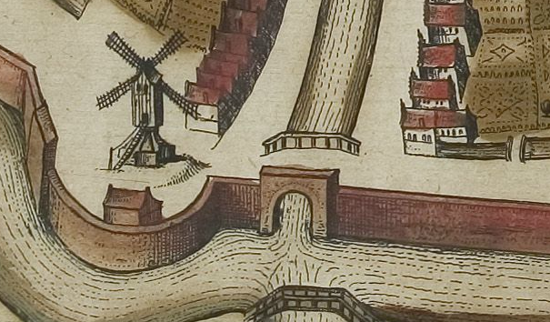 Uitsnede van de Klein-Paalderpijp en het Zuider Ronddeel, te zien is ook de Zuidmolen